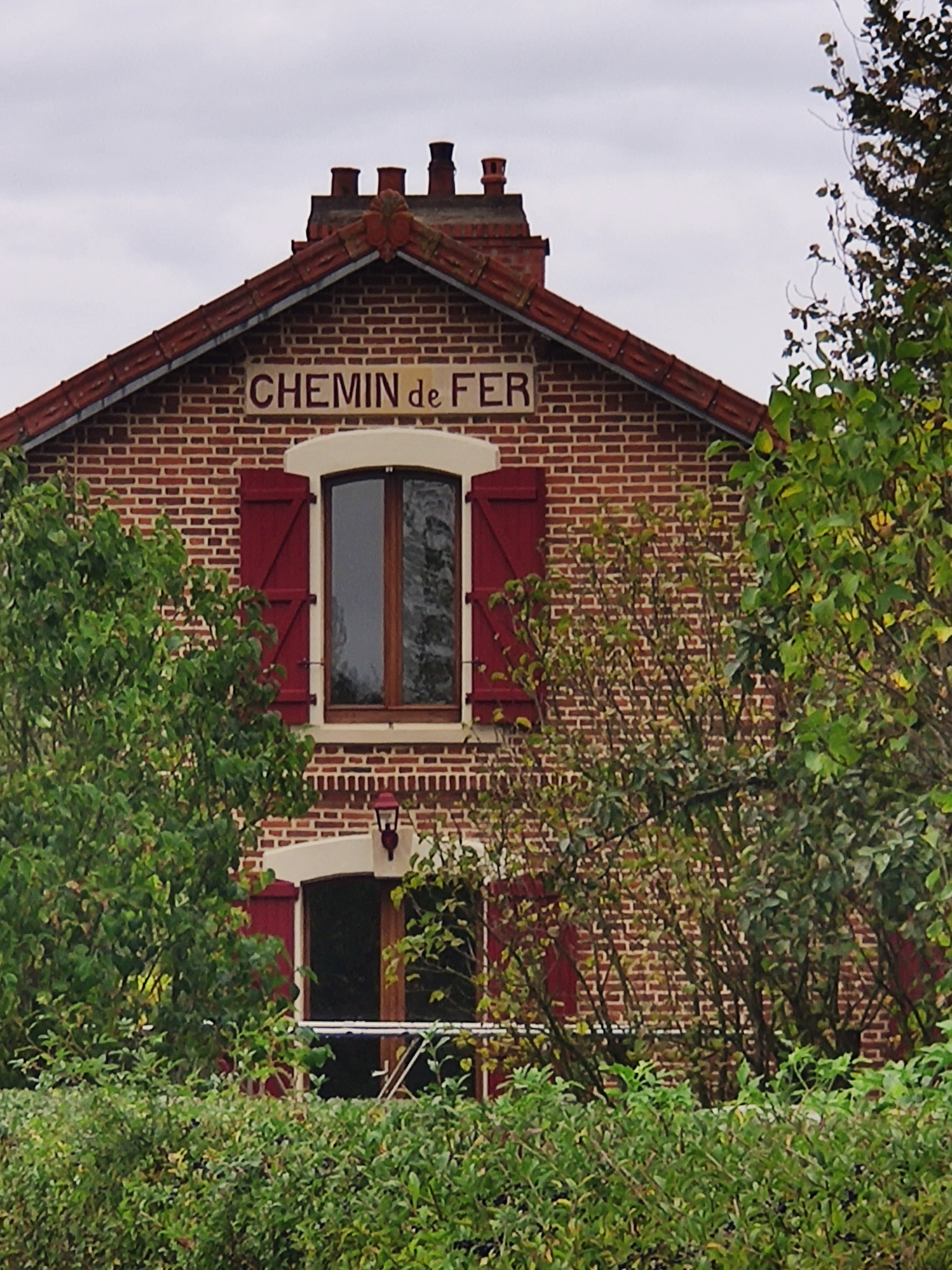 La gare de Raincheval-Arquèvres, située sur le territoire communal de Beauquesne, des Chemins de fer départementaux de la Somme le long de la RD 11, à la limite départementale du Pas-de-Calais, en 2019.